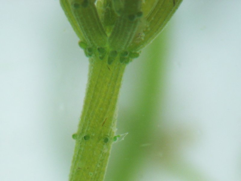 Gegensätzliche Armleuchteralge Chara contraria, Stipularen und Stacheln, Müritz-Gebiet